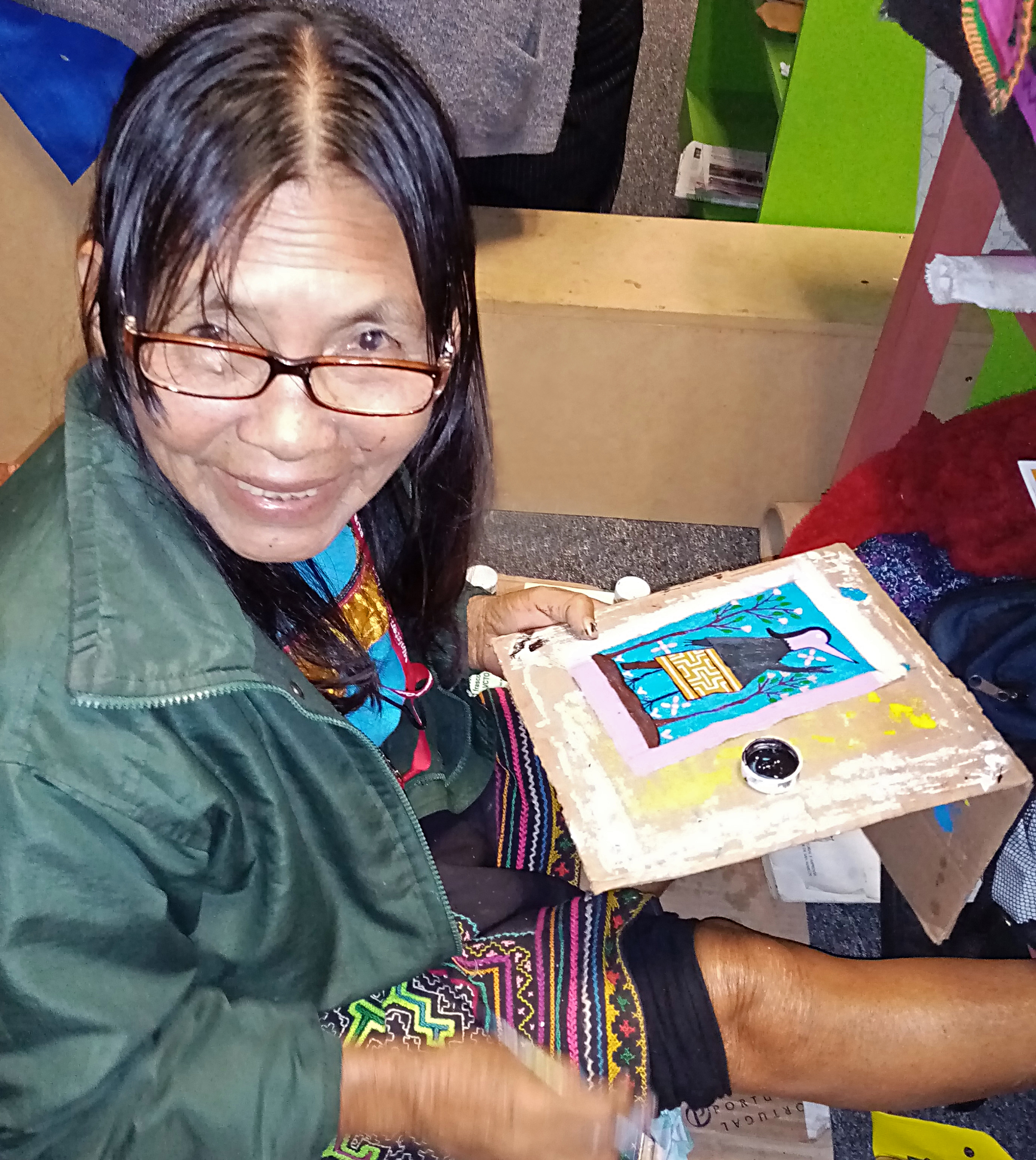 Lastenia Canayo pintando la Dueña del pájaro picaflor. En la Exposición venta Ruraq maki, hecho a mano, diciembre 2020.